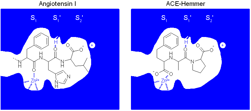 Molekularer Wirkmechanismus der ACE-Hemmer. Erstellt von: Sven Jähnichen. Erstellt am: 08.11.2004. Lizenz: GNU-FDL